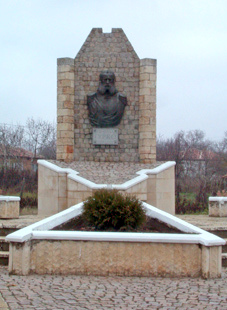 Паметник на генерал Гурко в село Гурково, Община Балчик.